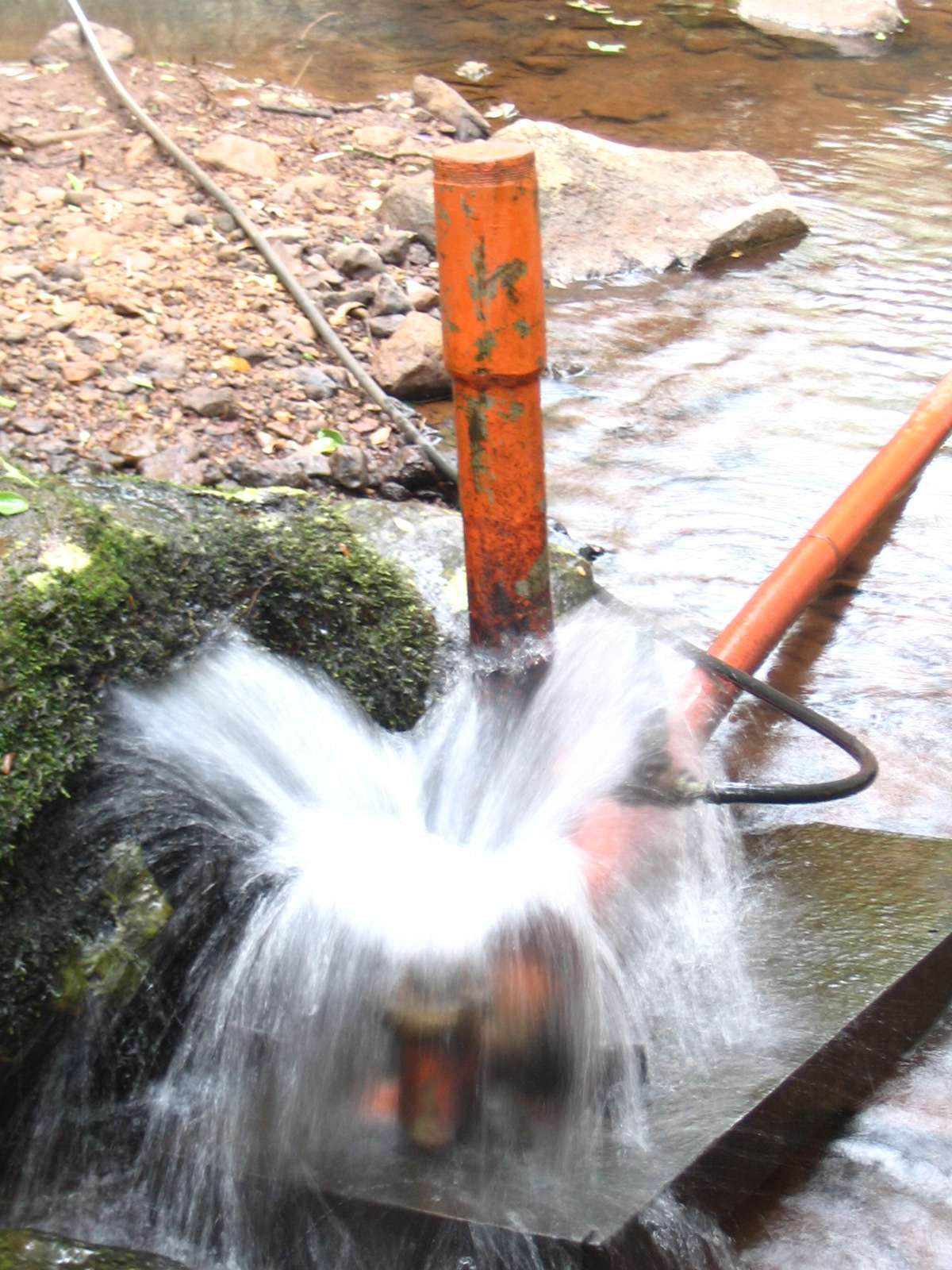 Foto ariete hidráulico en fase de aspiración en un arroyo del monte misionero en la localidad de Oberá, Misiones, Argentina.